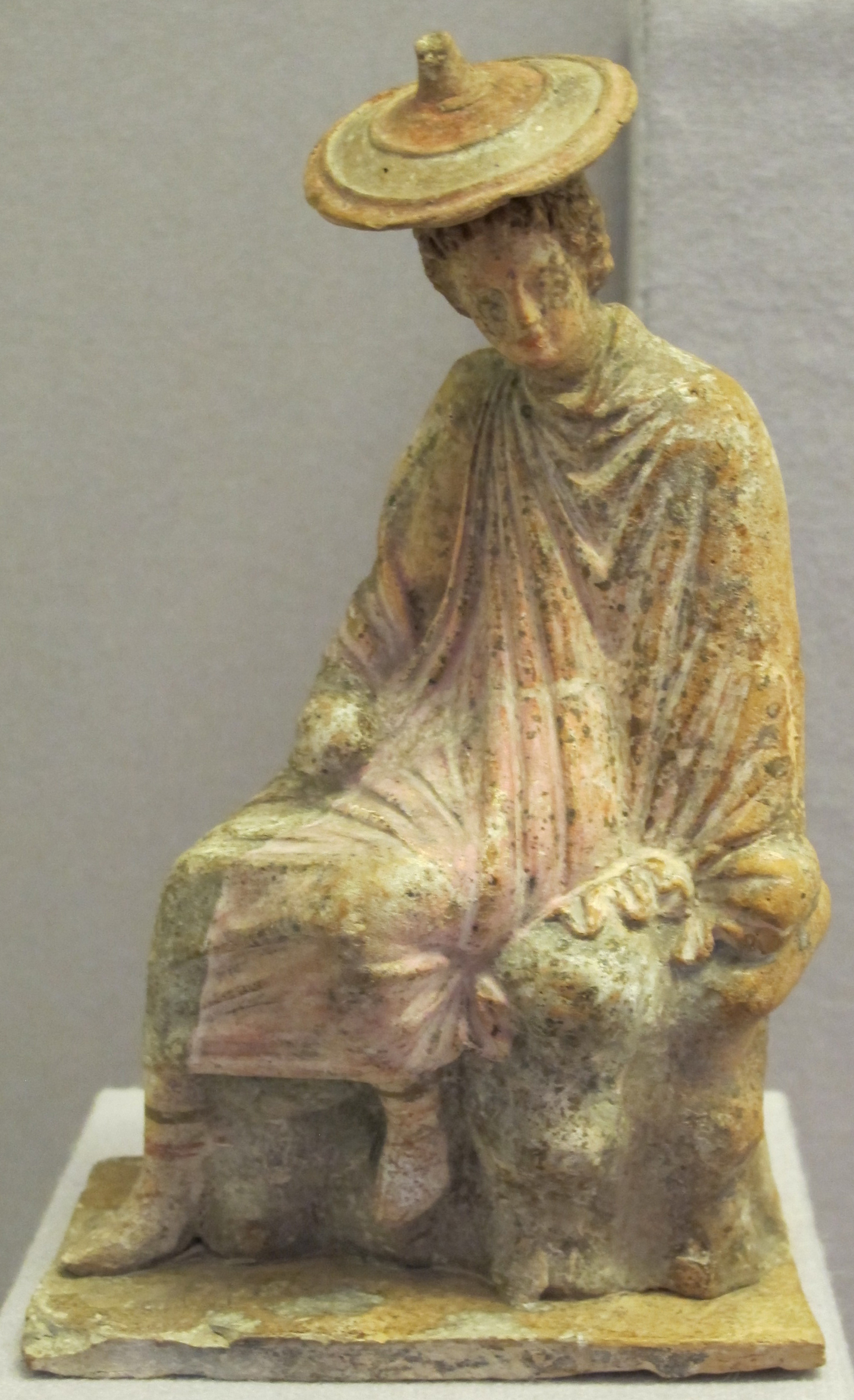 Terracotta da tanagra, giovane seduto su una roccia, 300-250 ac.